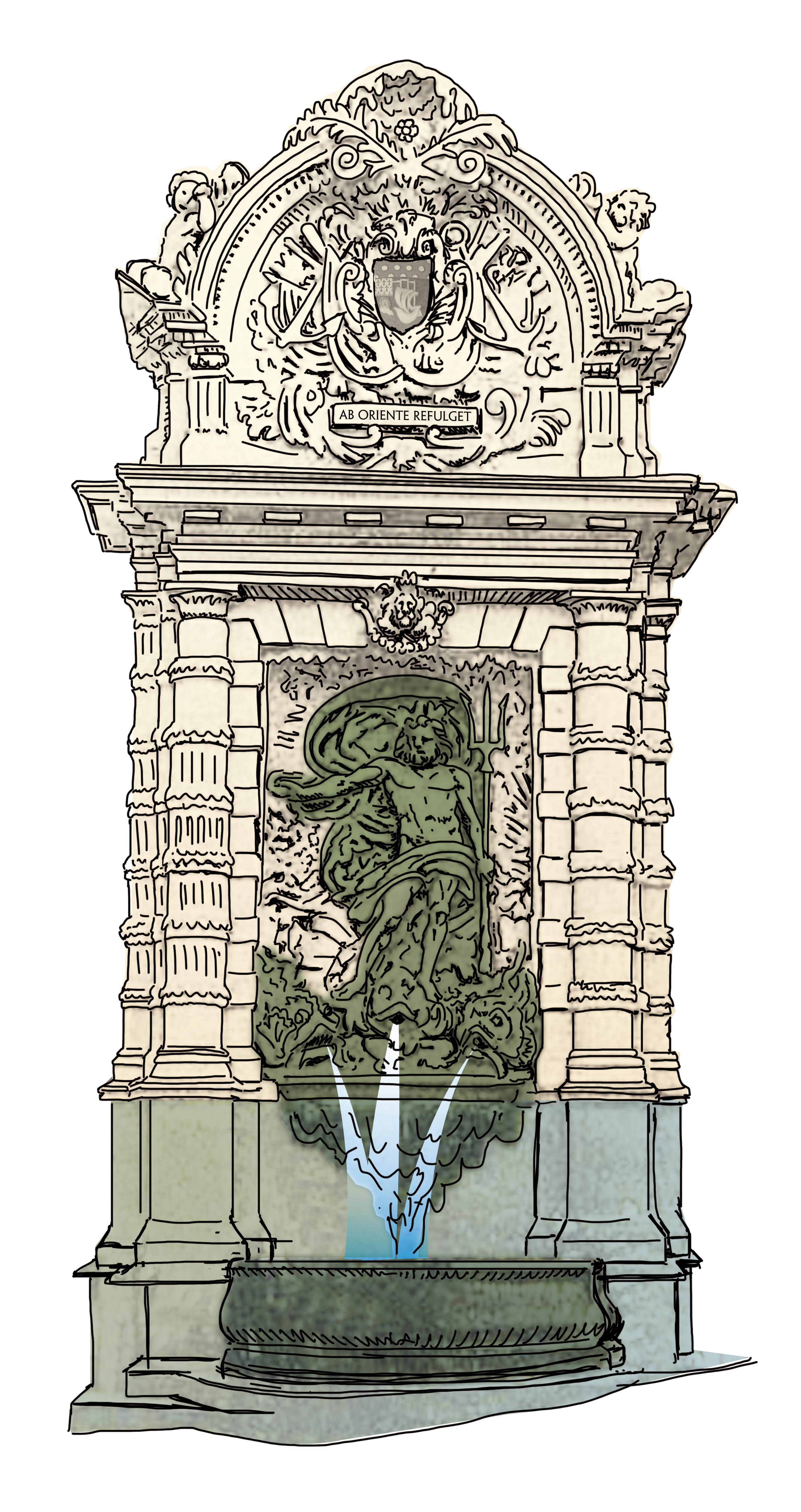 Fontaine Neptune de Lorient détruite par la Seconde Guerre Mondiale